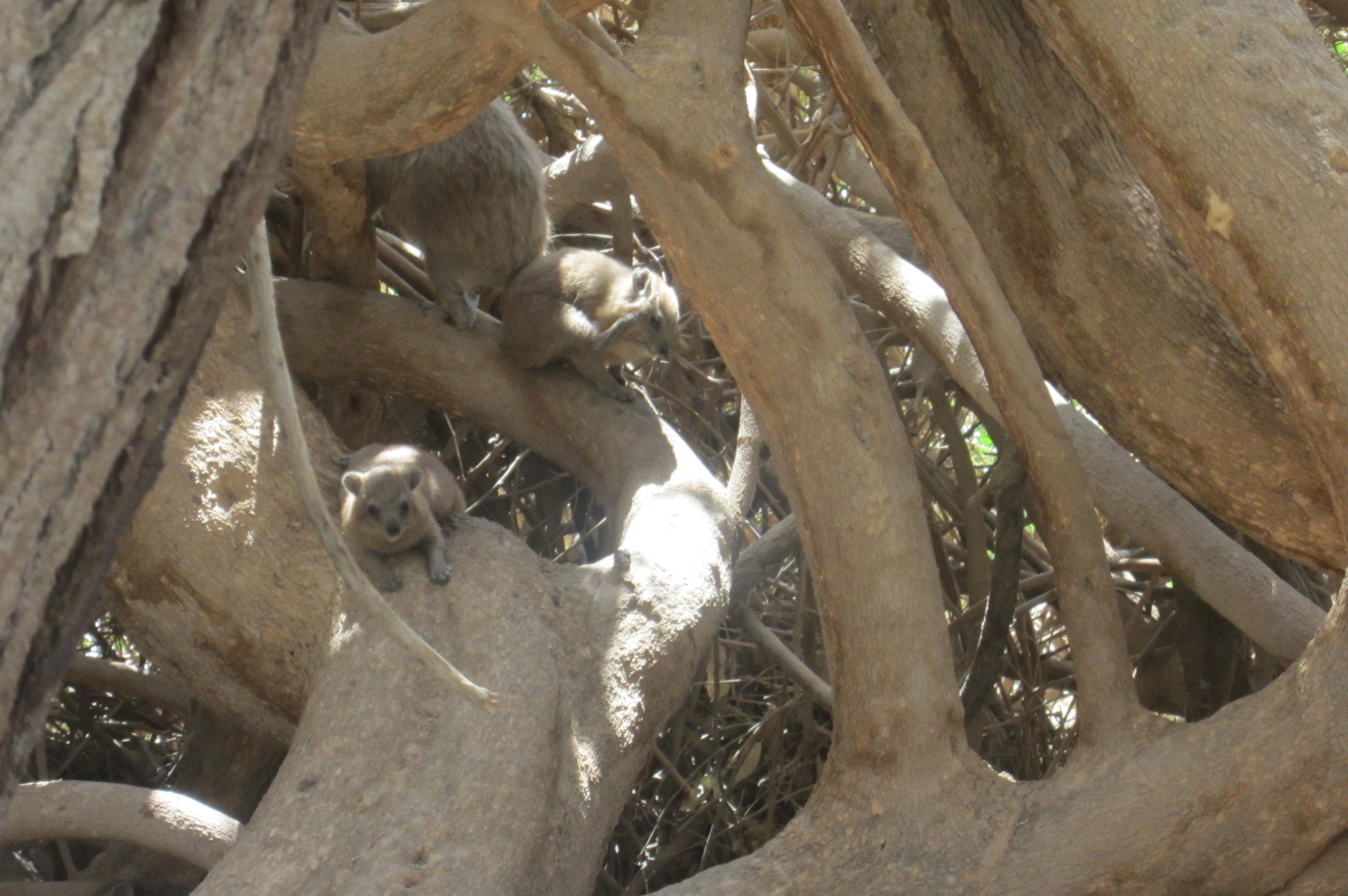 כמה חיות על עץ בכניסה לשמורת עין גדי.